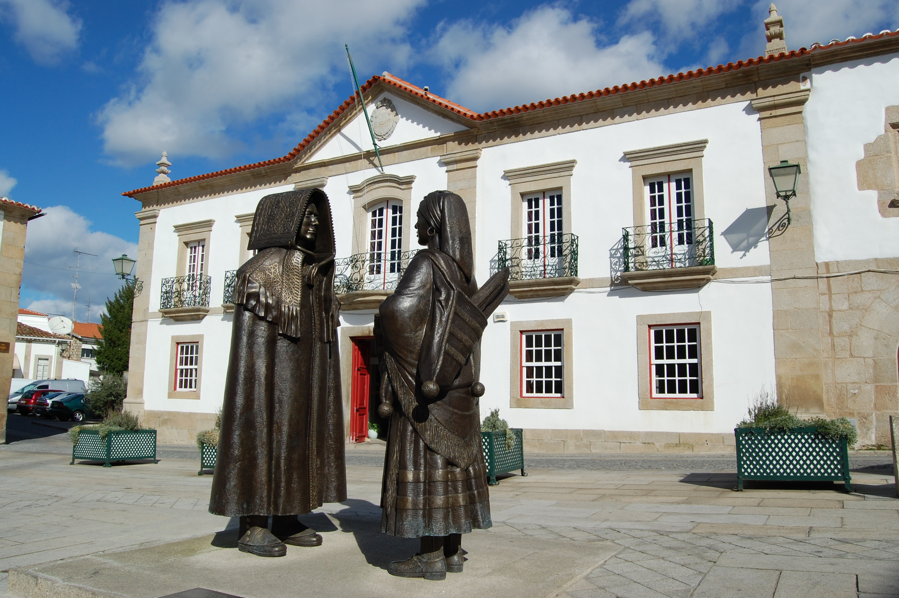 Miranda do Douro, Portugal.